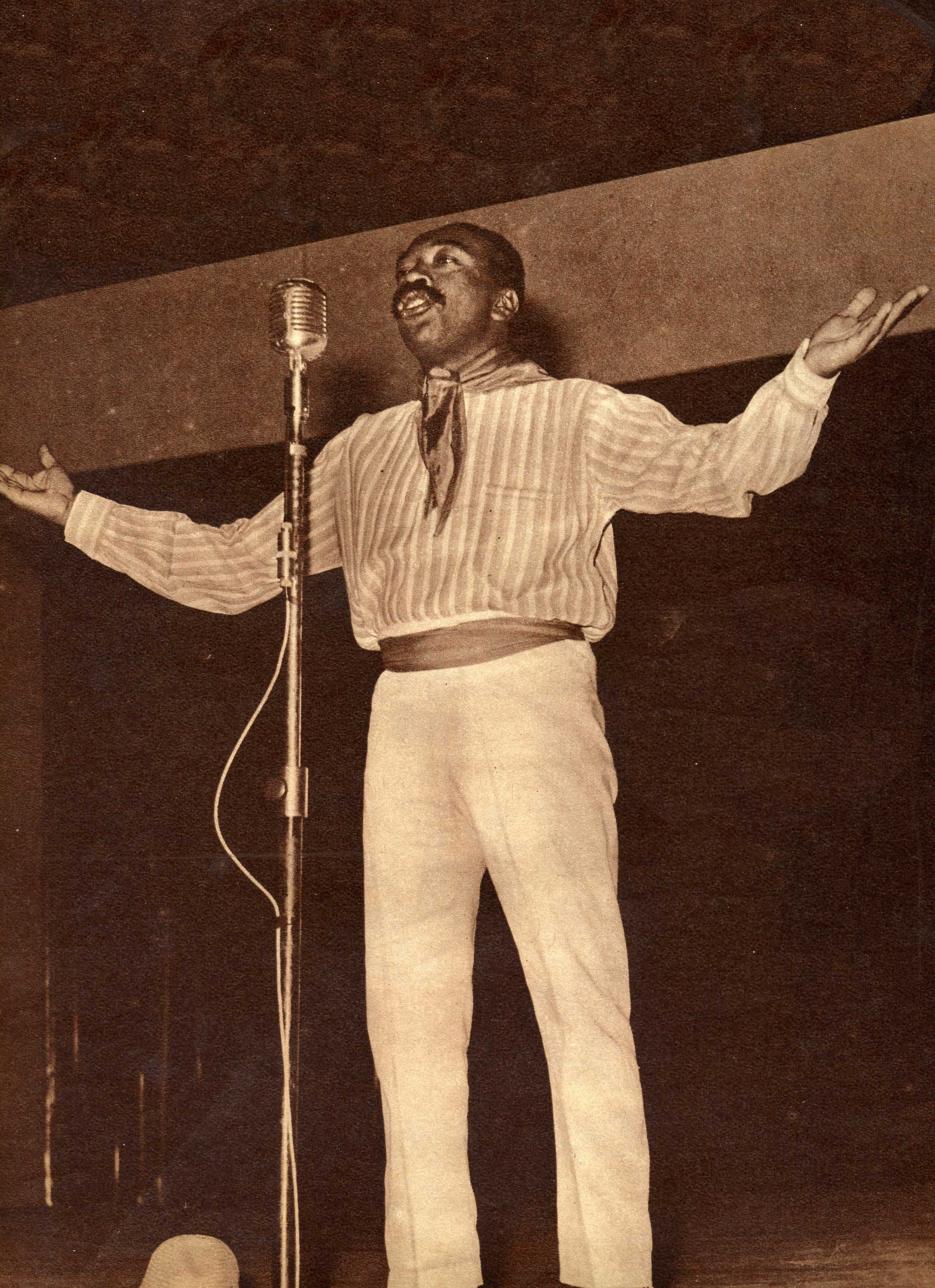 Nicomedes Santa Cruz, músico y poeta afroperuano.